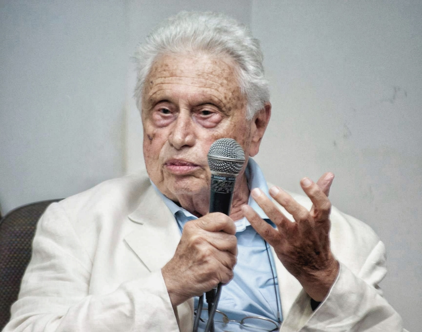 Il documentarista Luigi Di Gianni in un incontro ad Albano di Lucania (PZ) nel 2014